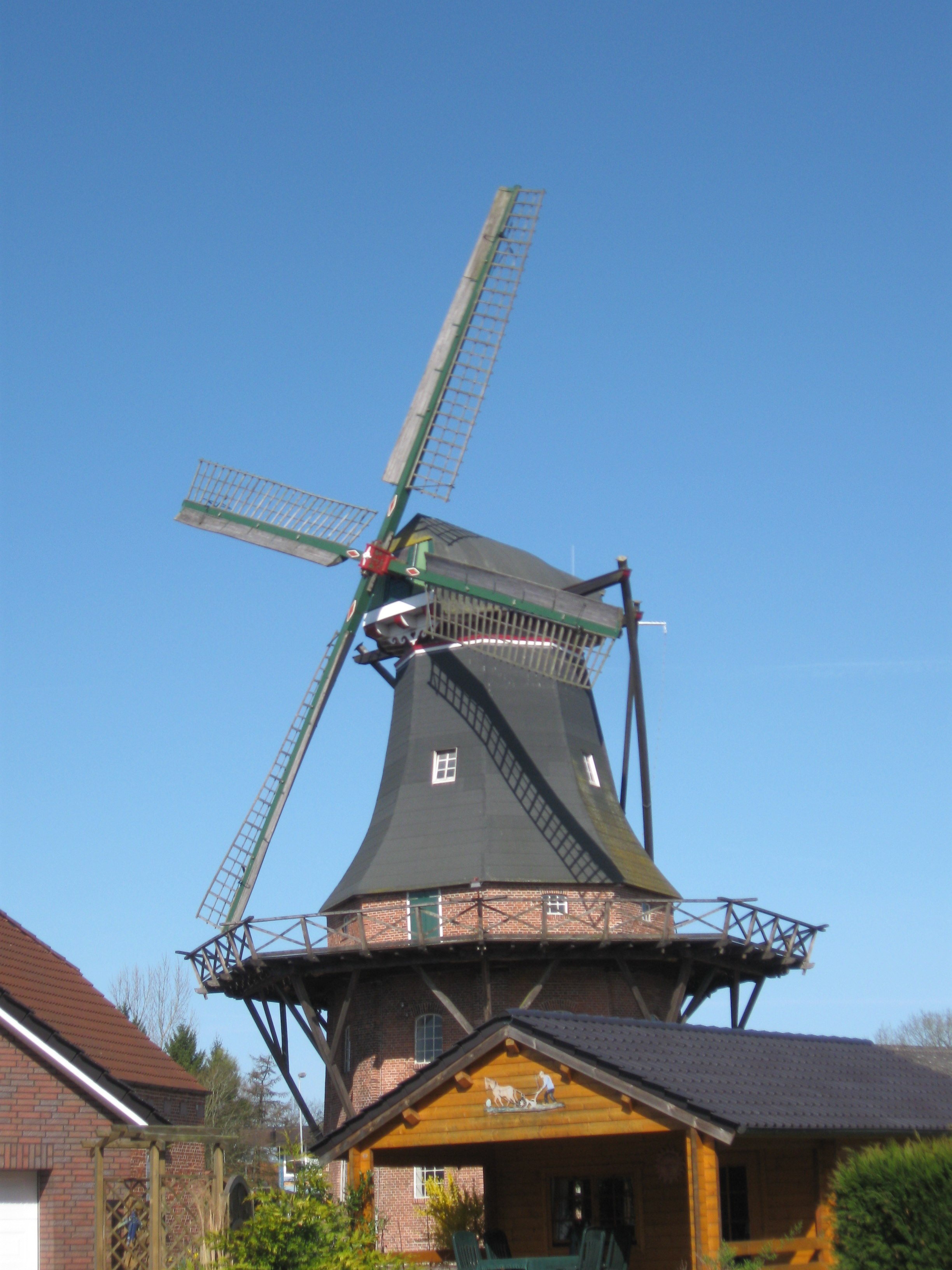 Windmühle, Gallerieholländer in Aurich-Haxtum. Die Anlage befindet sich in Privatbesitz und wird als Landhandlung genutzt.